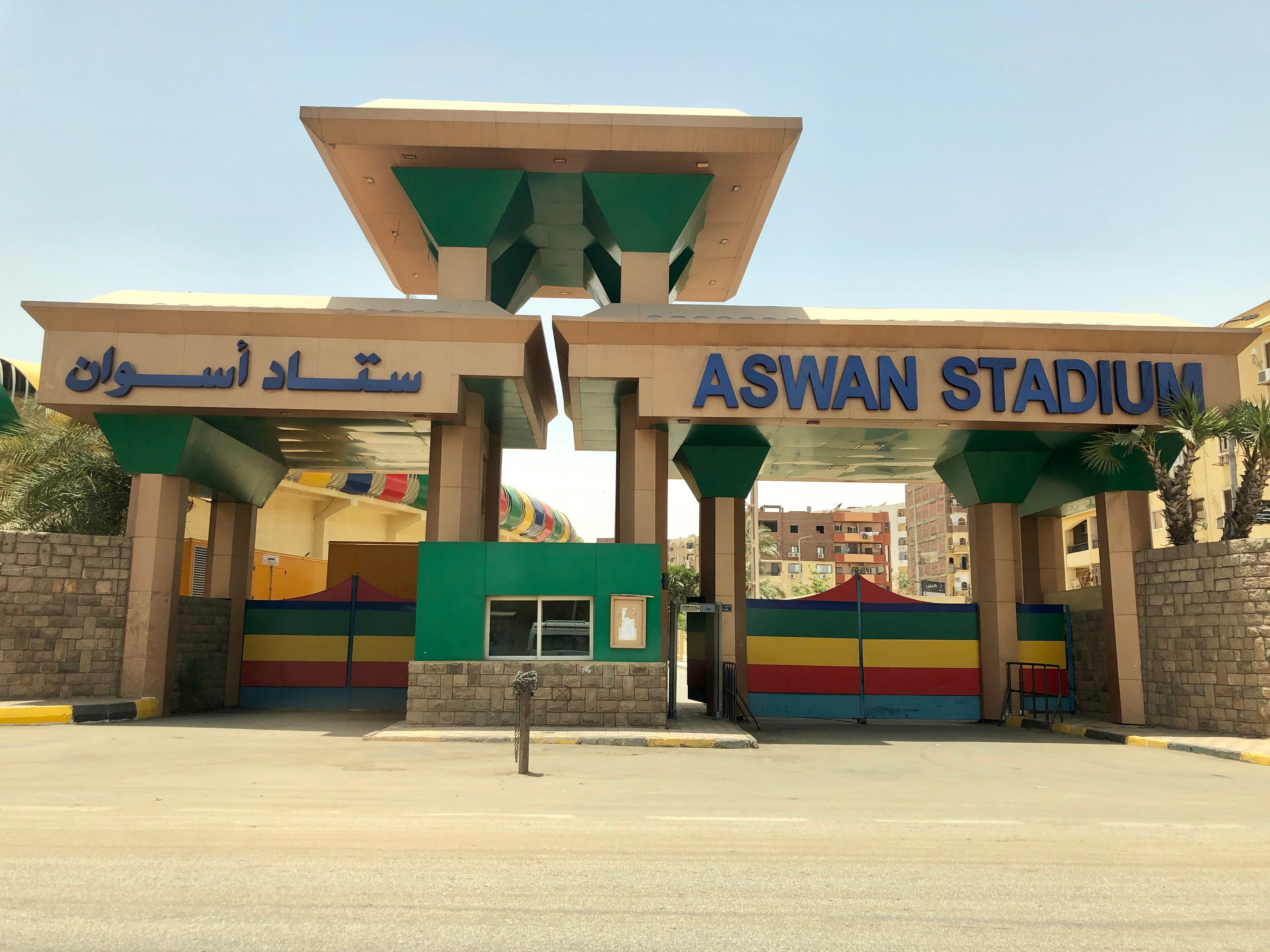 Aswan Stadium, Aswan, AG, EGY